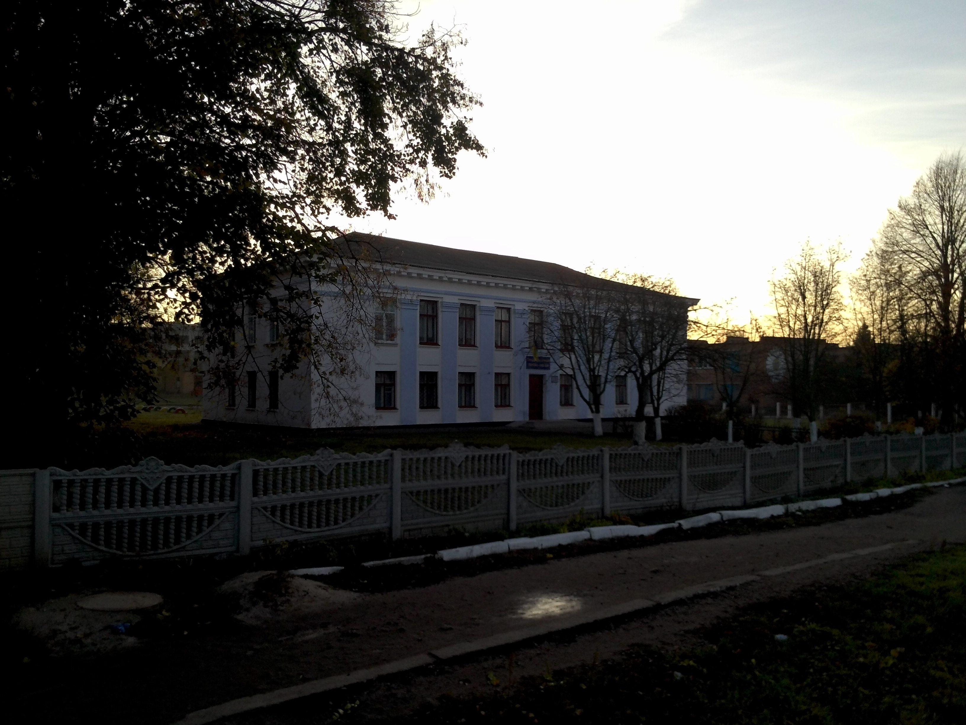 Школа №2 у смт Турбів